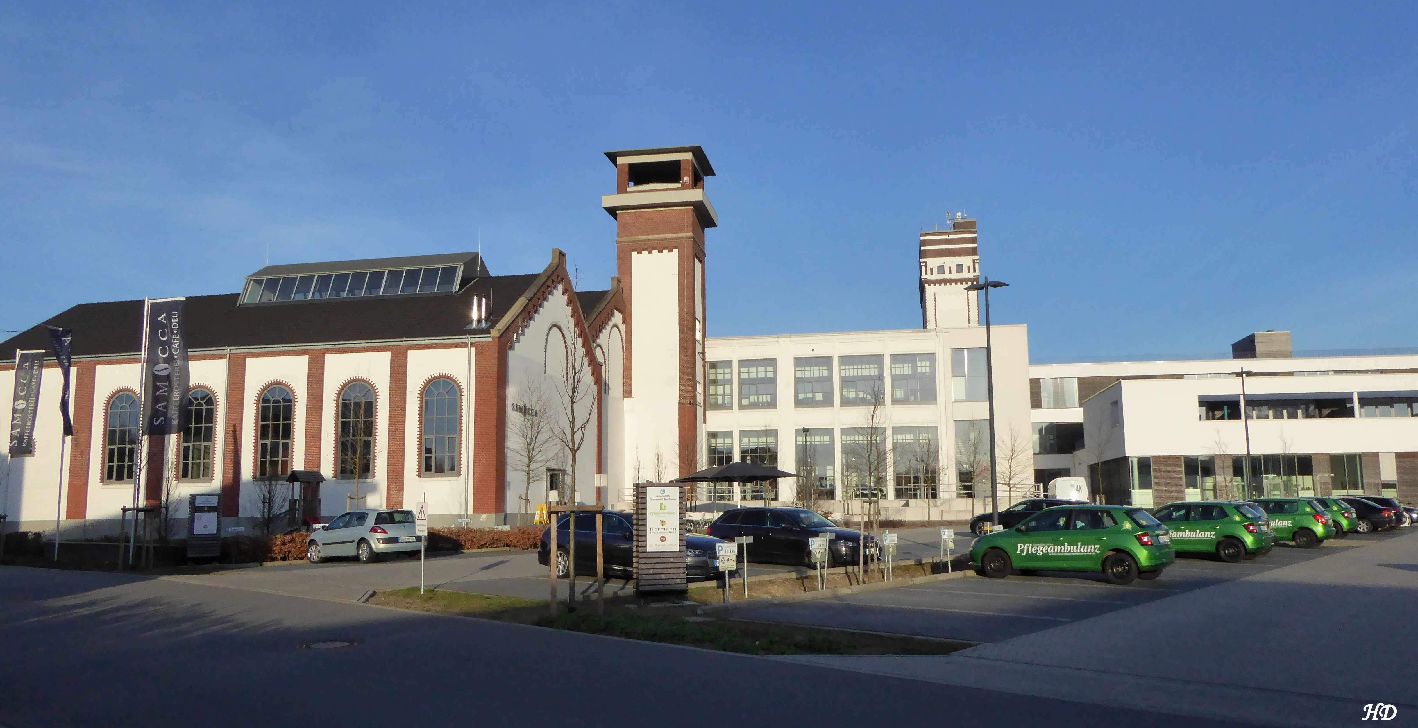 Neue Firmen siedelten sich in den umgebauten Fabrikgebäuden an.